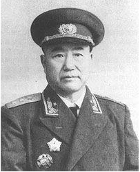 1955 董其武上将